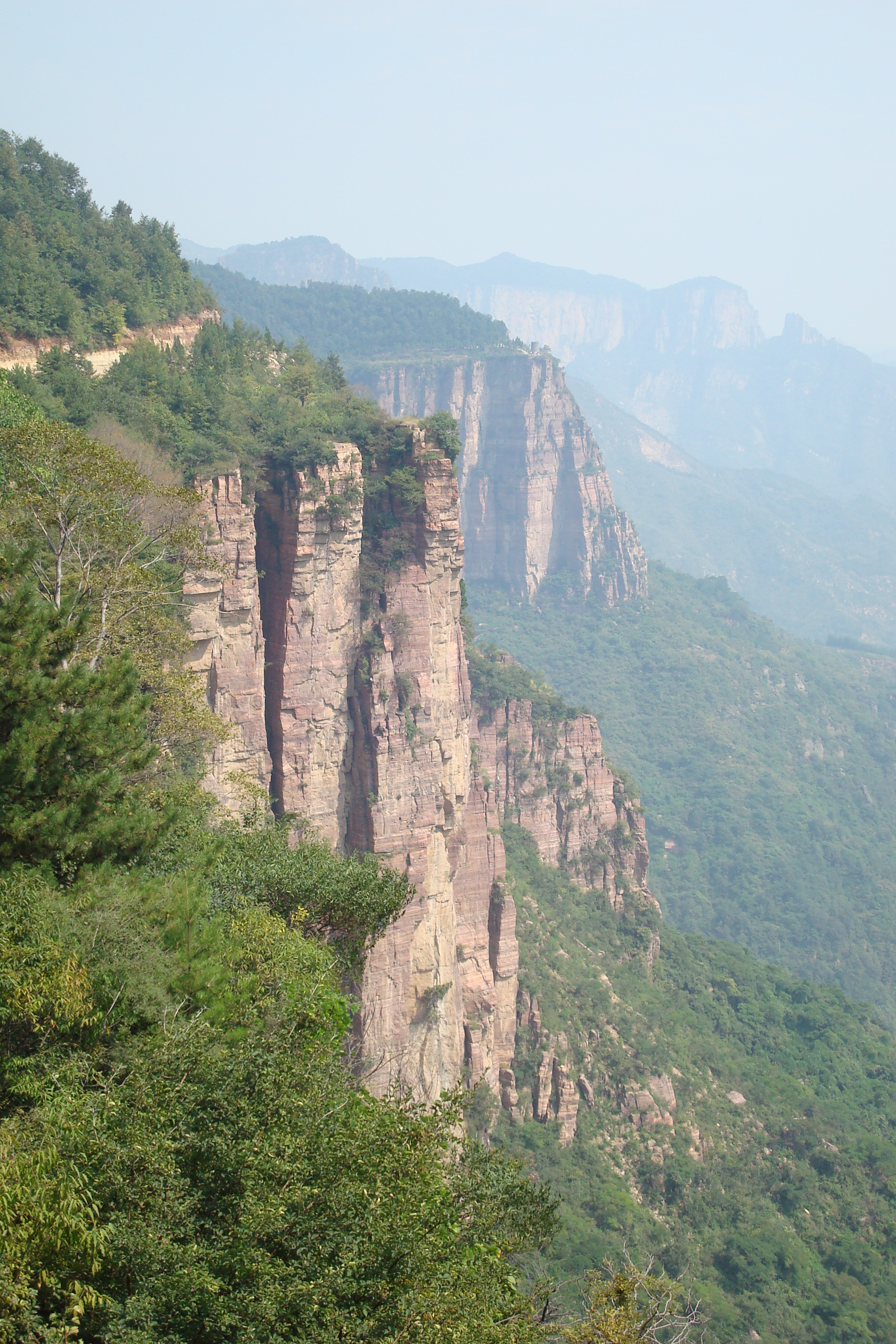 郭亮村两侧的绝壁